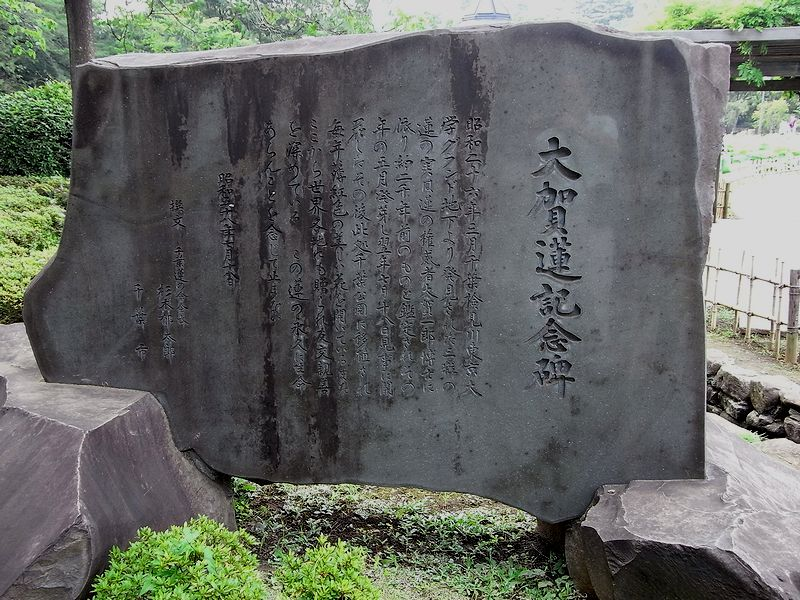 （2008年7月13日撮影）